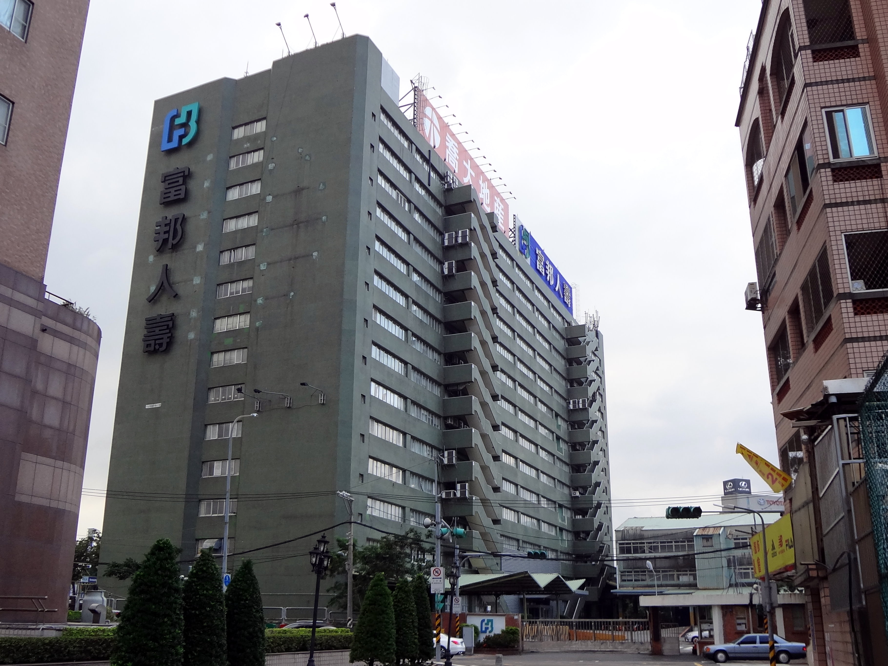 富邦承德大樓公館路側。